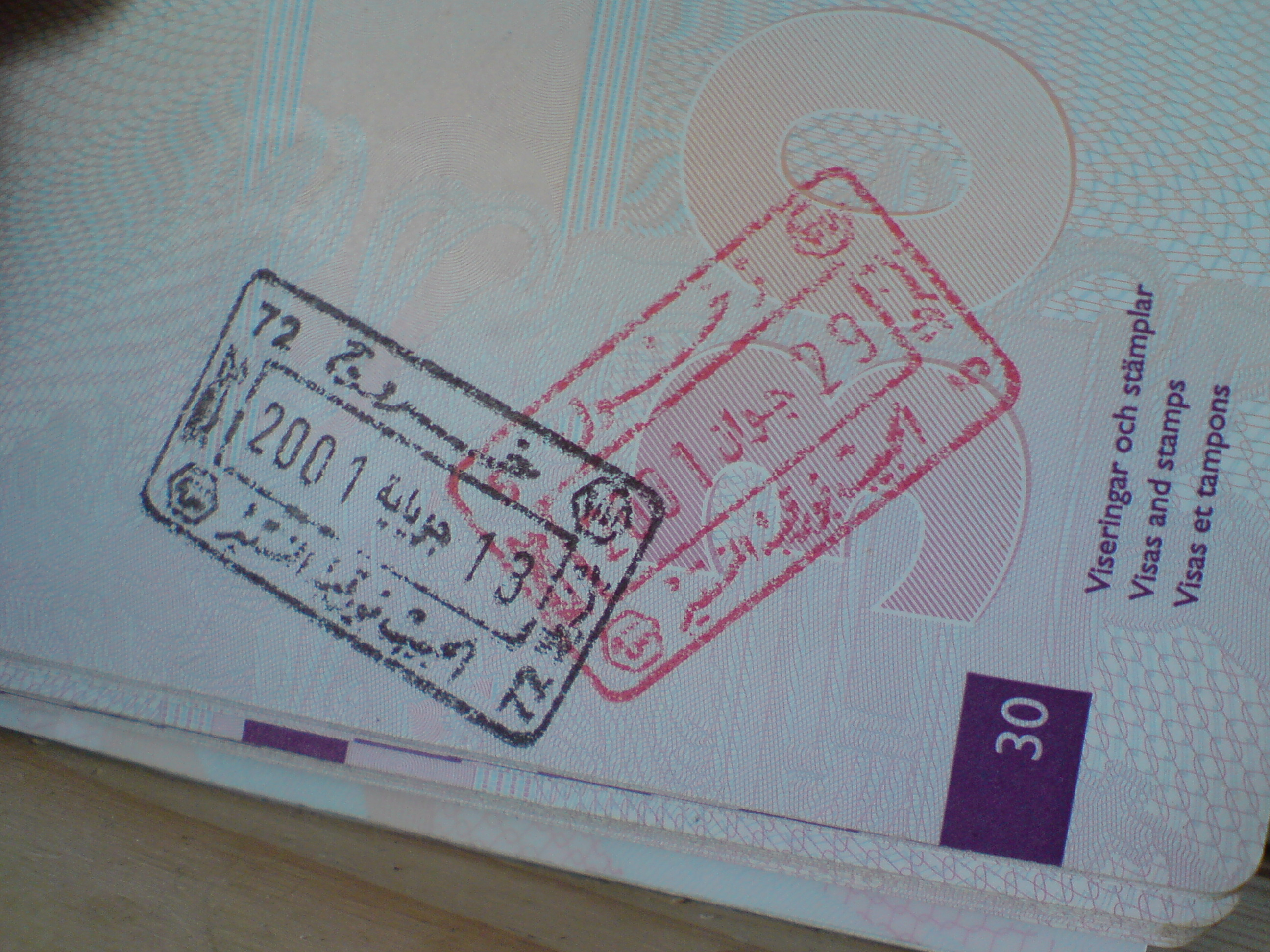 Tunisian passport stamps